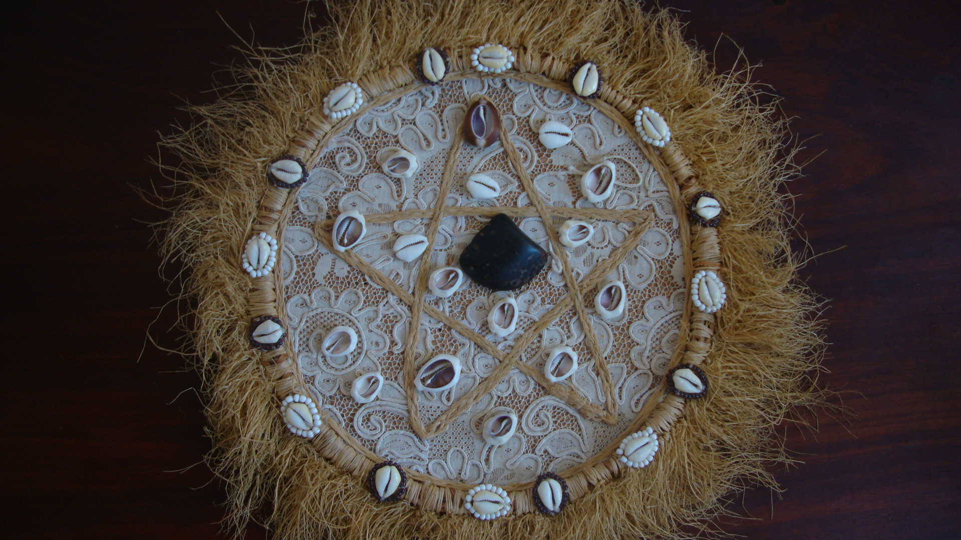 Odu Etaogundá, Três búzios abertos, Merindilogun, Salvador, Bahia, Brasil